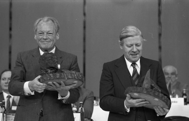 SPD-Parteitag in der Olympiahalle in München